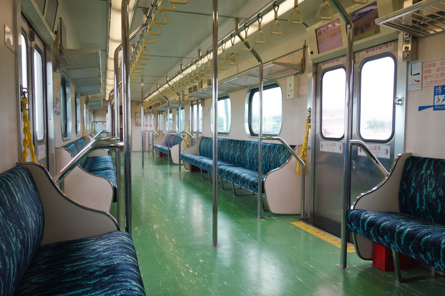 台鉄EMU600形電車ET614車内。